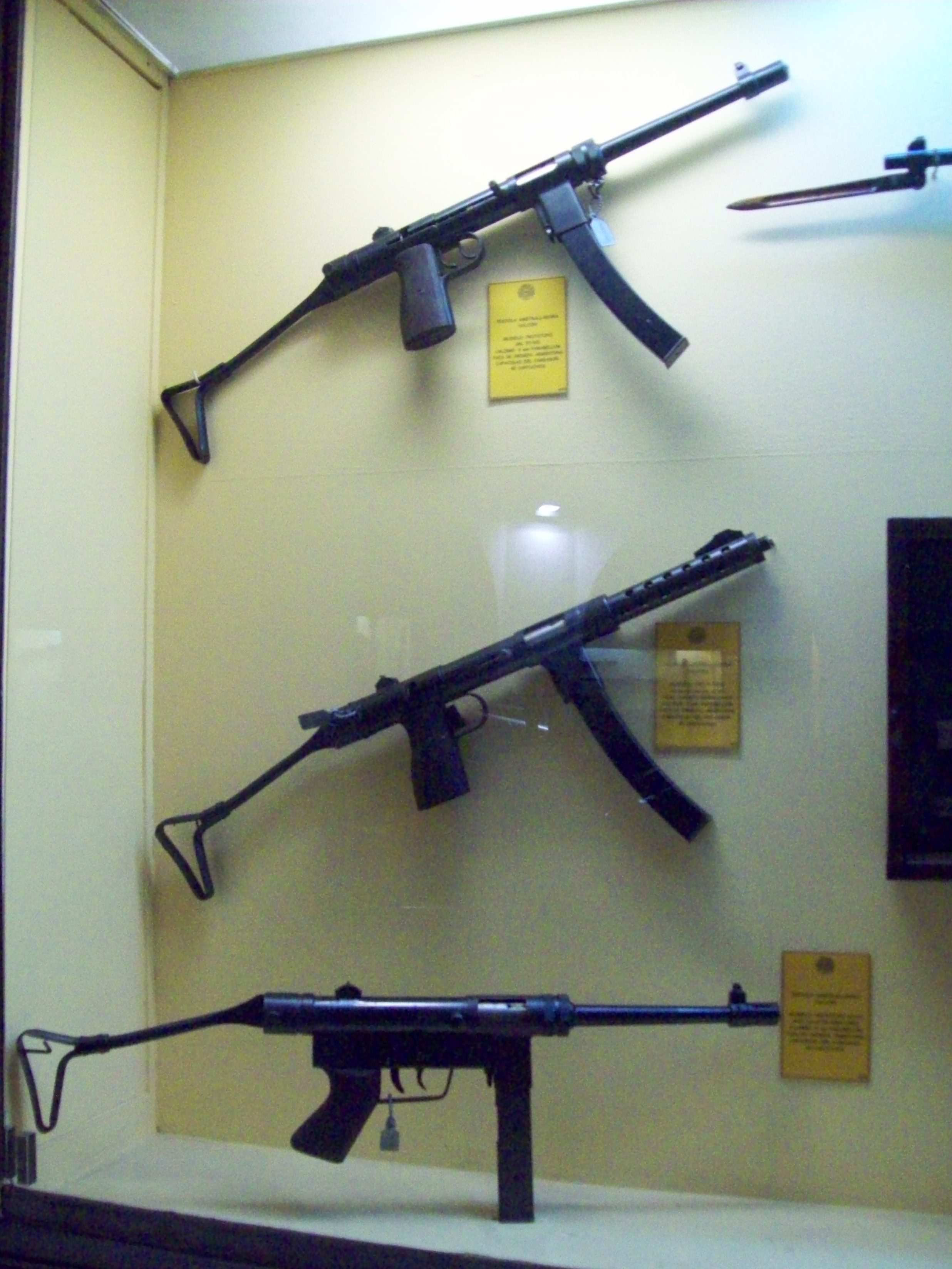 Armamento expuesto en el Museo de Armas de la Nación, ciudad de Buenos Aires, Argentina 2014.